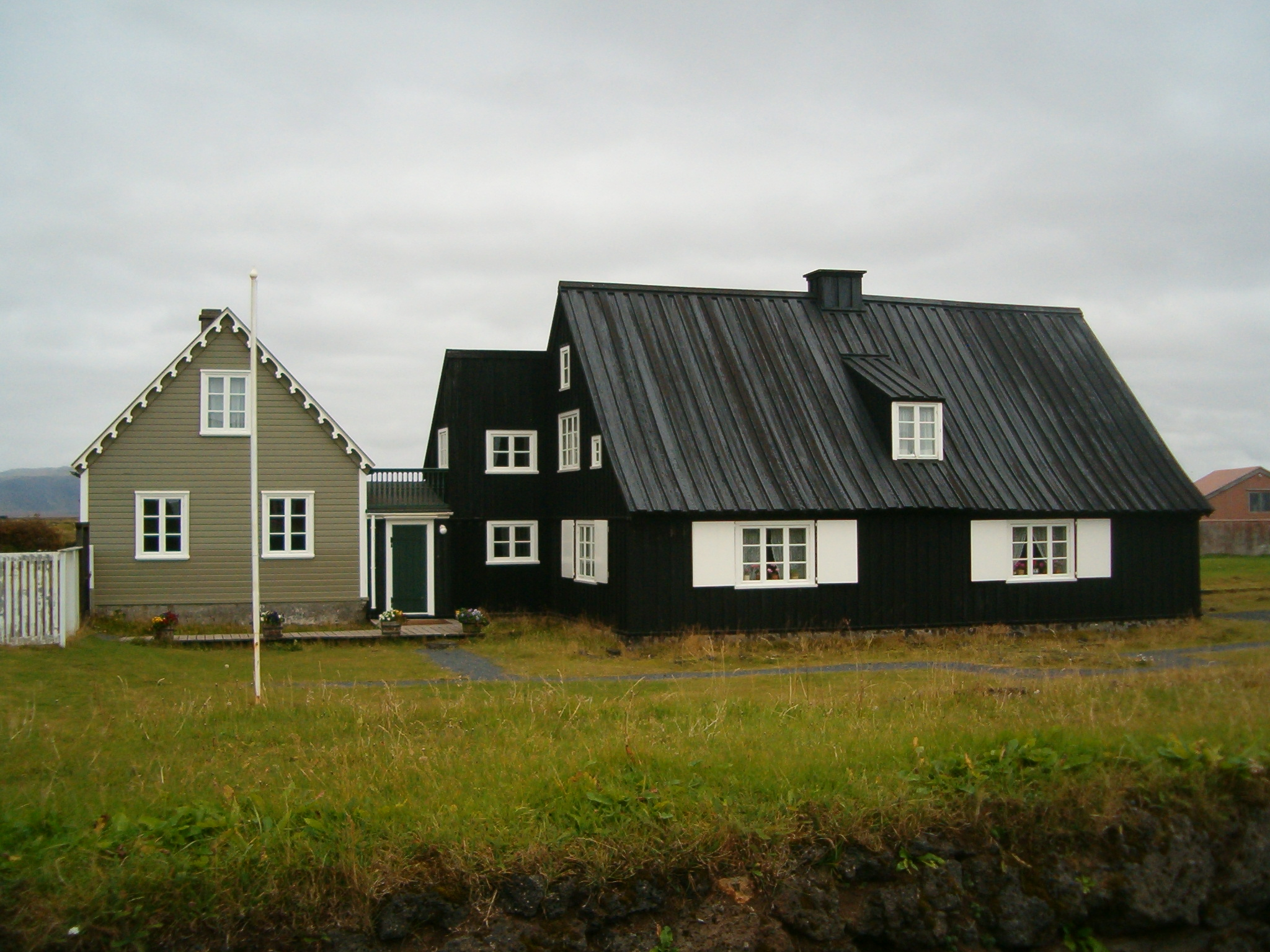 Houses in Eyrarbakki, Iceland